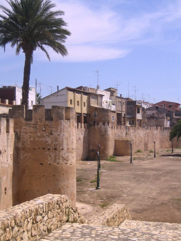 Circuito amurallado de Alzira (España).